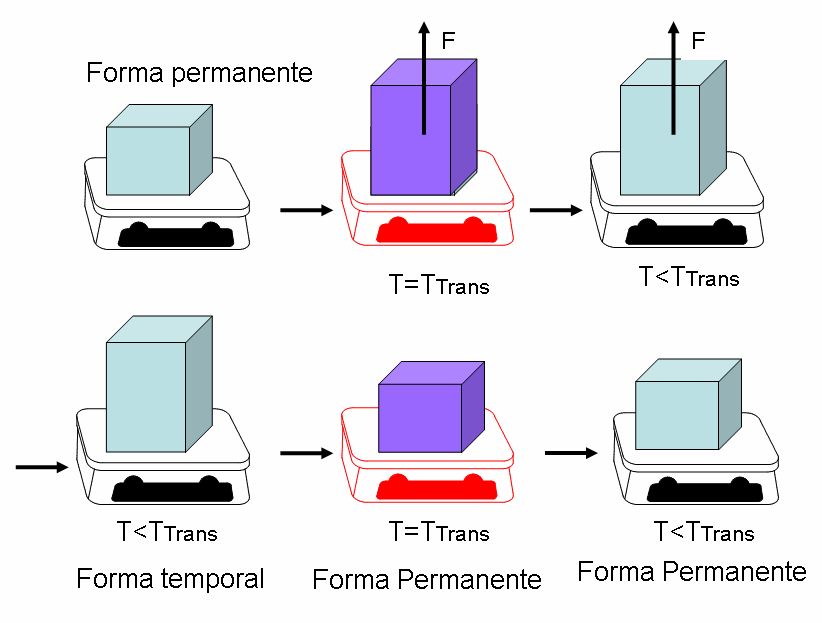 Programación del efecto térmico de memoria en un polímero dado